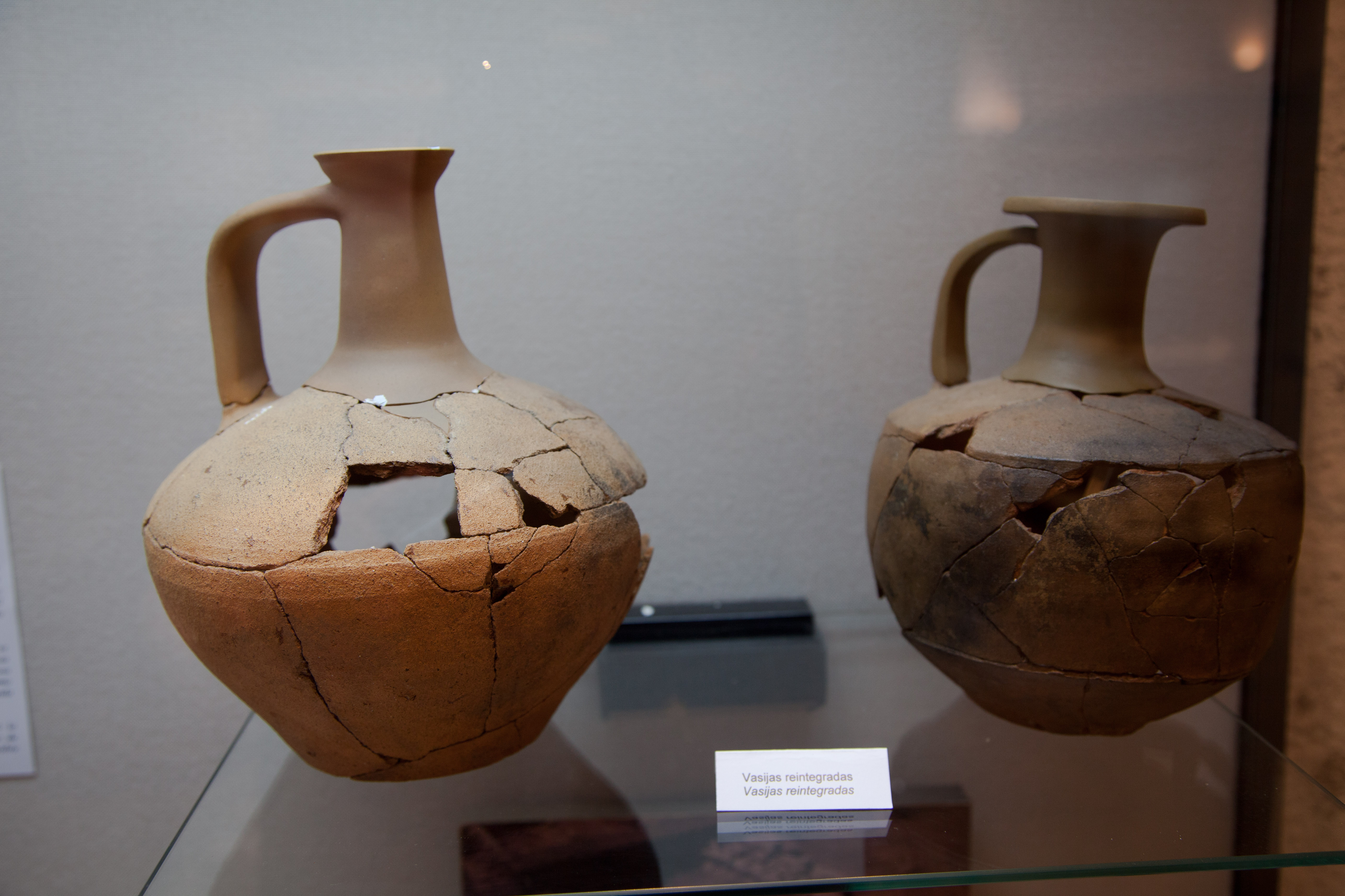 Campamento militar de Cidadela Sobrado dos monxes, A Coruña. OS CAMPAMENTOS ROMANOS Asentamentos permanentes das tropas levantados en lugares estratéxicos dun territorio. Son de planta rectangular e as dimensións están en función do número de tropas aloxadas. O sistema defensivo consiste nunha muralla que pecha todo o recinto, con torres nas esquinas e un foxo no exterior. O exército tivo un papel de promoción social recrutando á poboación local que atopou na carreira militar unha vía de adaptación ao novo estilo de vida. Foi un dos axentes da romanización máis directos. Na Gallaecia coñécense tres campamentos: Lucus Augusti, Ciadella e Aquis Querquennis, estes dous ocupados por tropas auxiliares dunha lexión: a cohorte (unidade de 500 homes). A situación estratéxica de Ciadella permitía o control dende a zona costeira de Brigantium ate Lucus Augusti. CAMPAMENTO ROMANO DE CIADELLA Campamento da Cohors I Celtiberorum, corpo auxiliar da Legio VII Gemina, que permaneceu nel dende o século II d.C. ate o IV d.C. A identidade desta unidade militar coñécese por varios testemuños epigráficos e por unha fonte escrita, a Notitia Dignitatum. O campamento foi ocupado posteriormente por unha poboación xermánica. Nas escavacións arqueolóxicas acháronse tegulae (tellas) coas marcas lexionarias, unha ara dedicada á deusa Fortuna, cerámicas, vidros, así como as moedas, algunha acuñada na segunda metade do século I d.C. No contorno do campamento está a necrópole da Areosa e unha serie de postos de vixiancia, dous deles sobre túmulos megalíticos.